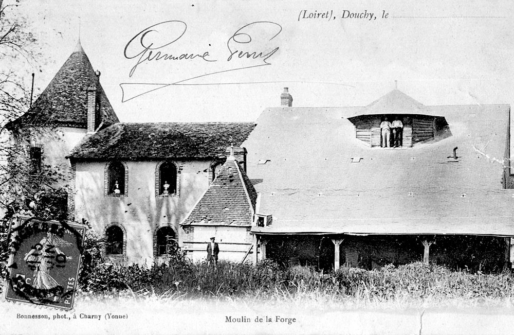 Moulin de la Forge, Douchy, Loiret, France